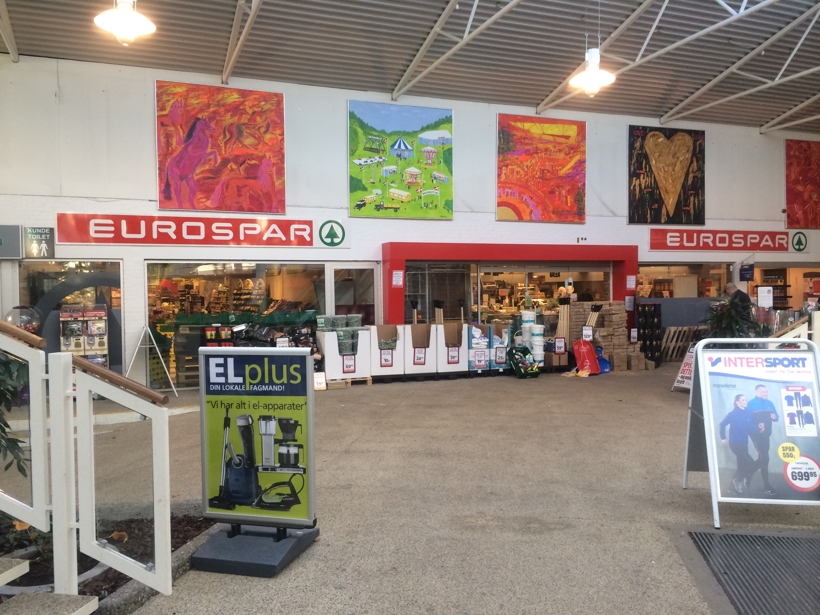 Udsmykning i Hadsund Butikscenter